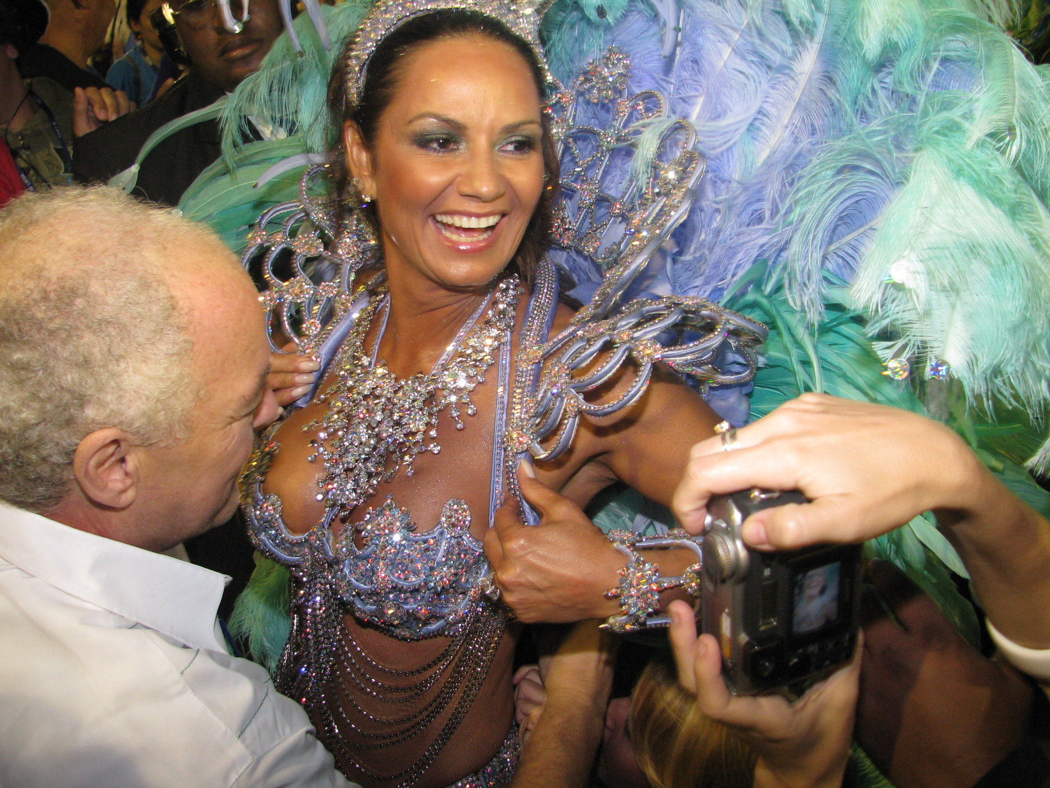 Brazilian actress Luíza Brunet